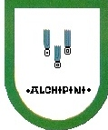 Escudo de Municipio de Guadalupe